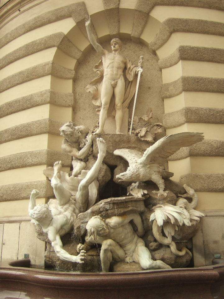 Wien - Edmund Hellmer: „Die Macht zu Lande“ (1897) - Brunnen mit Figurengruppe am Michaelerplatz an der Außenseite des Michaelertraktes der Hofburg - Giganten, ein Adler und eine Schlange, darüber eine männliche Figur - der Erzengel Michael?